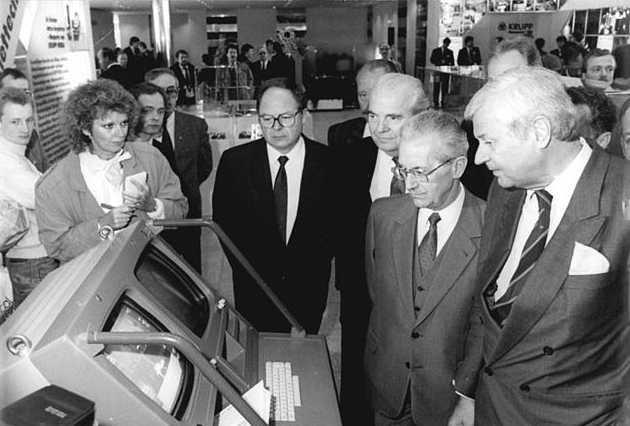 ADN-ZB Zimmermann-22.4.1988-A-BRD: Minister Beil besuchte Hannover-Messe Während der Besichtigung der Hannover-Messe besuchte der Minister für Außenhandel der DDR, Dr. Gerhard Beil (2.v.r.), auch die Ausstellung der Friedrich Krupp GmbH. R.: Vorstandsvorsitzender Dr. Wilhelm Schneider: 3.v.r.: Dr. Ewald Moldt, Leiter der Ständigen Vertretung der DDR in der BRD.